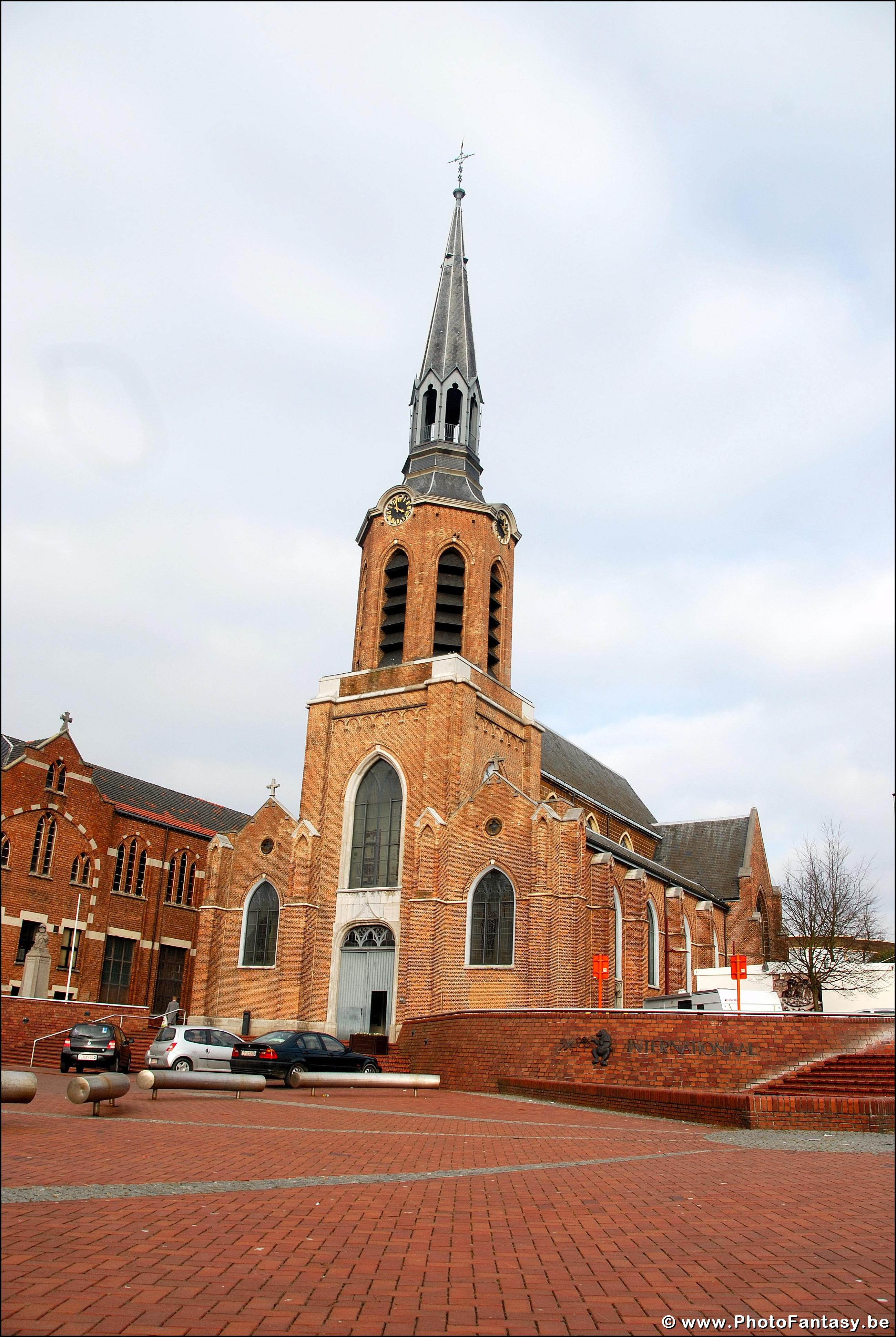 België, Beringen, Sint-Pieters-Banden kerk